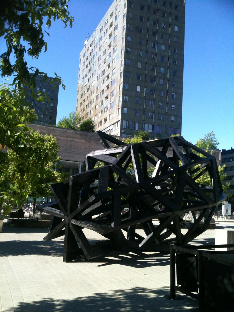 OpenArt2014